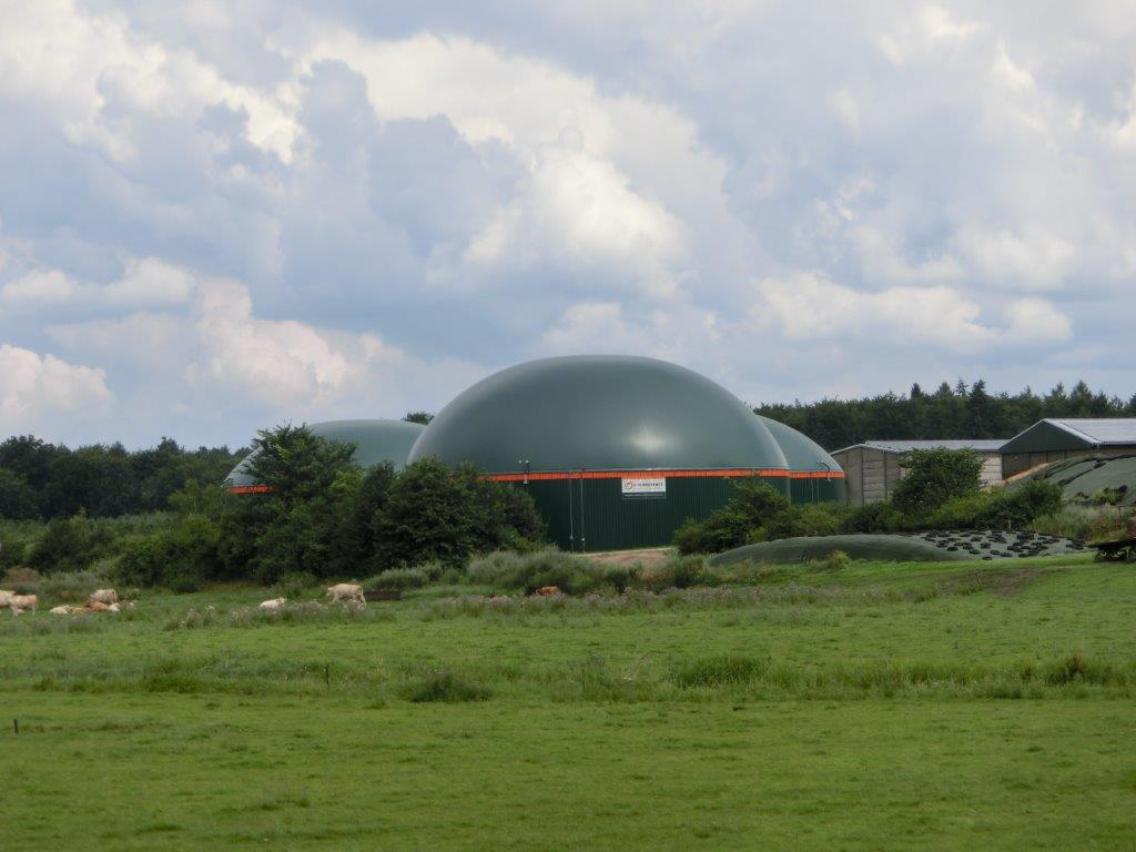 Biogasanlage in Wredenhagen